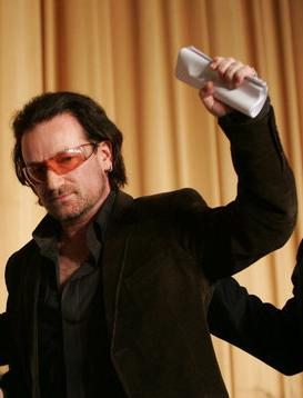 Bono